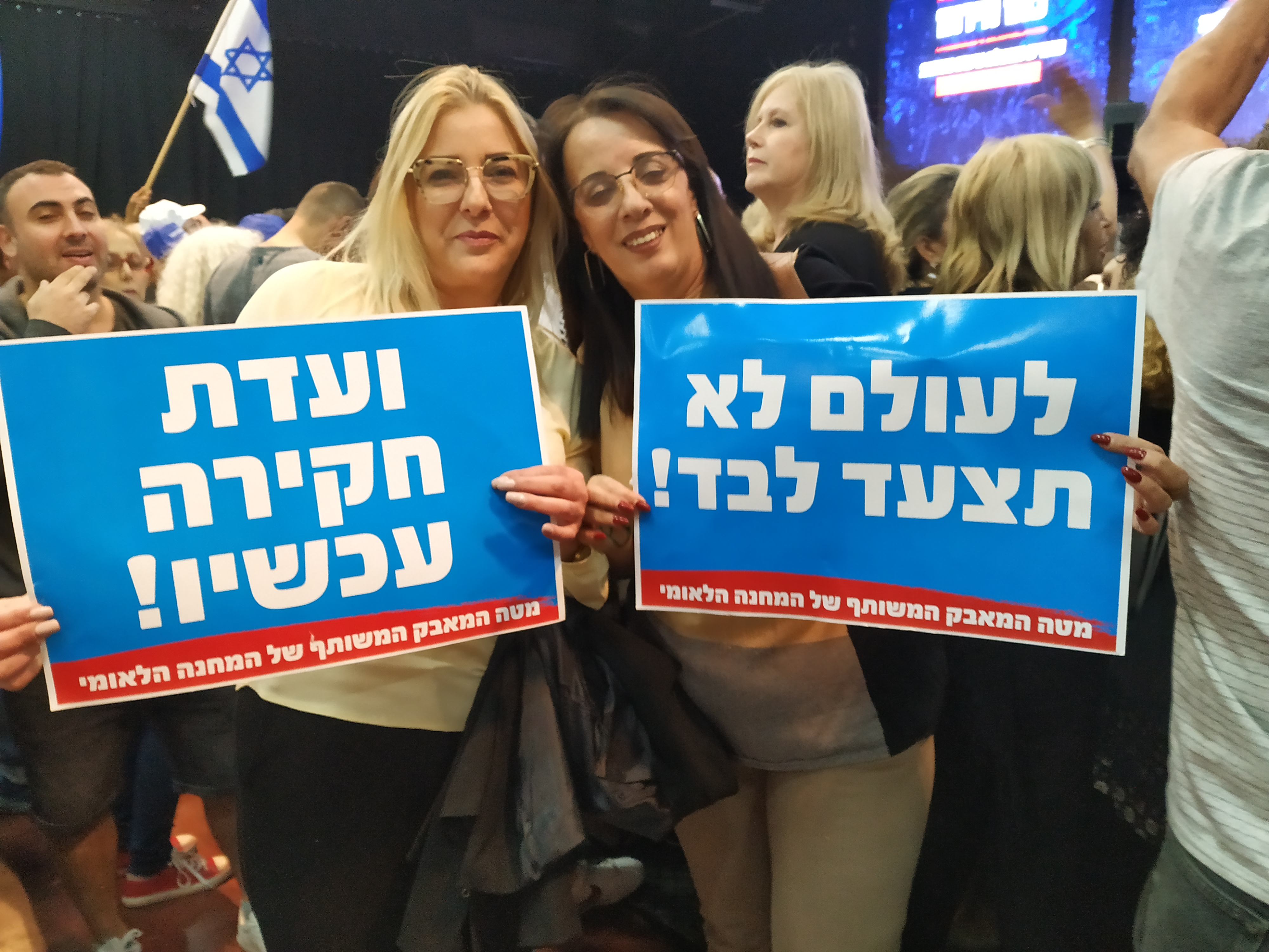 כנס החירום של הליכוד, גני התערוכה, 17 בנובמבר 2019